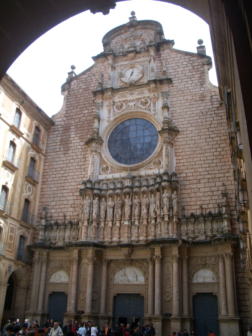 A bazilika homlokzata Montserratban (Montserrat, Katalónia, Spanyolország)